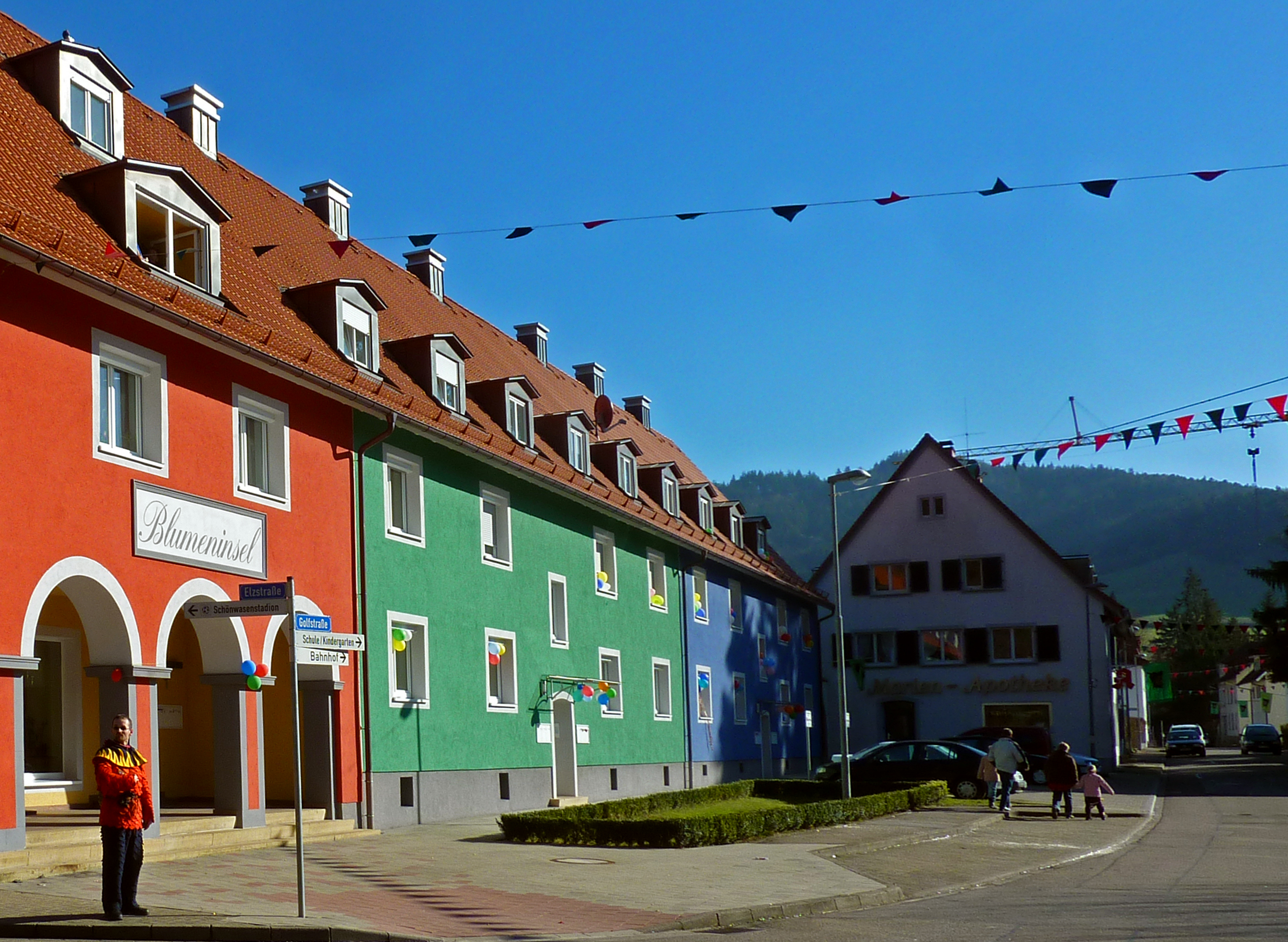 Die Golfstraße in Gutach im Breisgau, mit Wimpeln und Luftballons dekoriert für das Narrentreffen vom 4.-6. Februar 2011, das das 50jährige Jubiläum der örtlichen Narrenzunft D'r Johli zelebrierte. Links im Bild steht der Waldkircher Bernd Armbruster, der das Häs der Kollnauer Feuerteufel trägt.